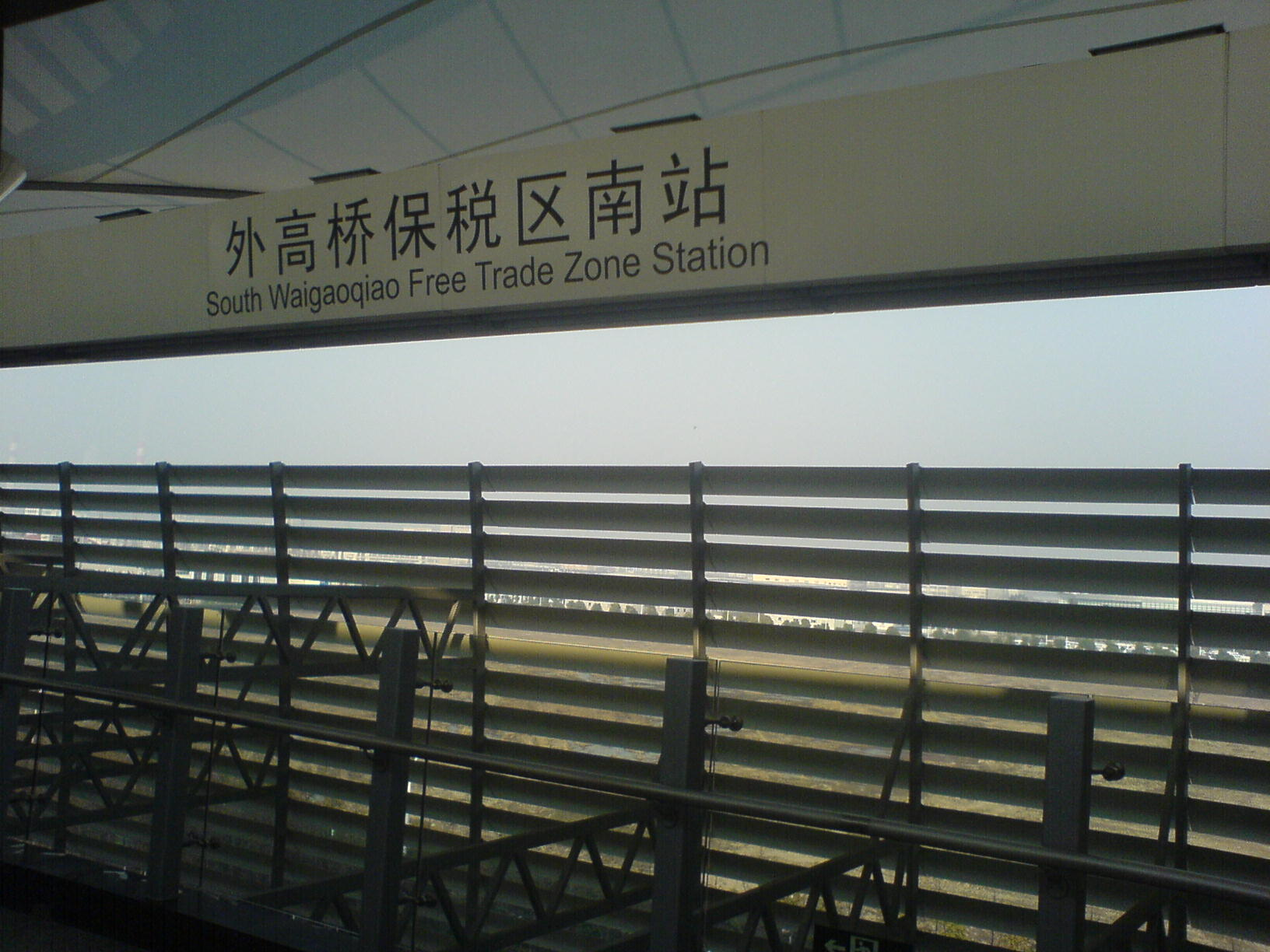 外高桥保税区南站站台